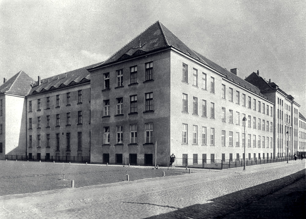 Szpital Wolski, widok z rogu ulic Górczewskiej i Płockiej